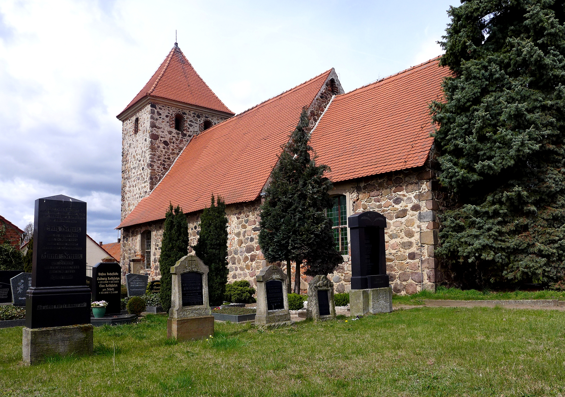 Ritze, Ortsteil von Salzwedel: Feldsteinkirche und Friedhof an der Chüdenallee.